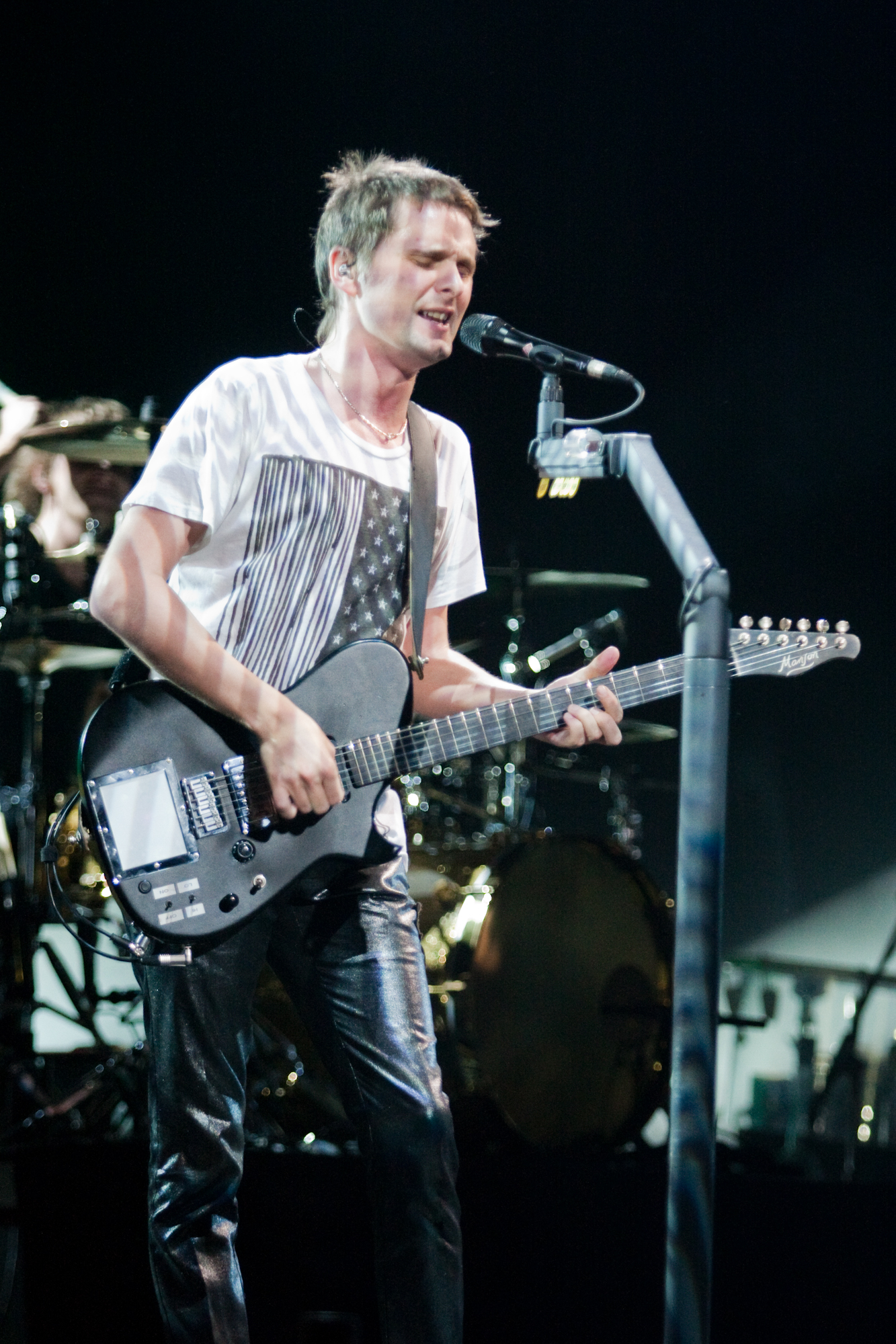 Muse-3